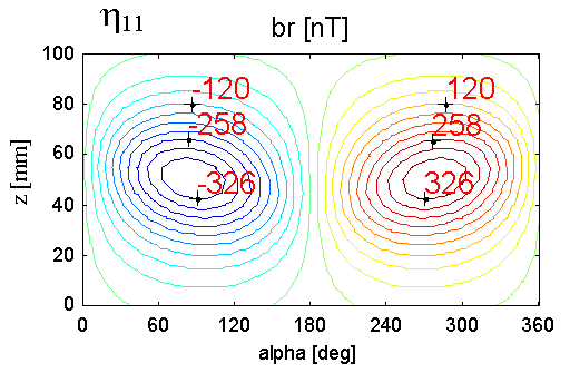 Лицензиране